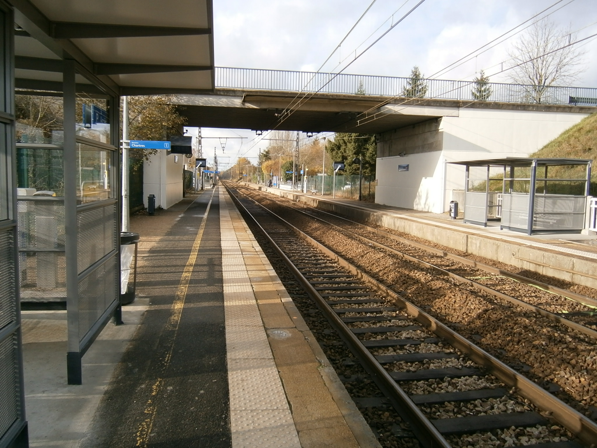 Gare de Gazeran (78) : Vue en direction de Chartres, des abris voyageurs.